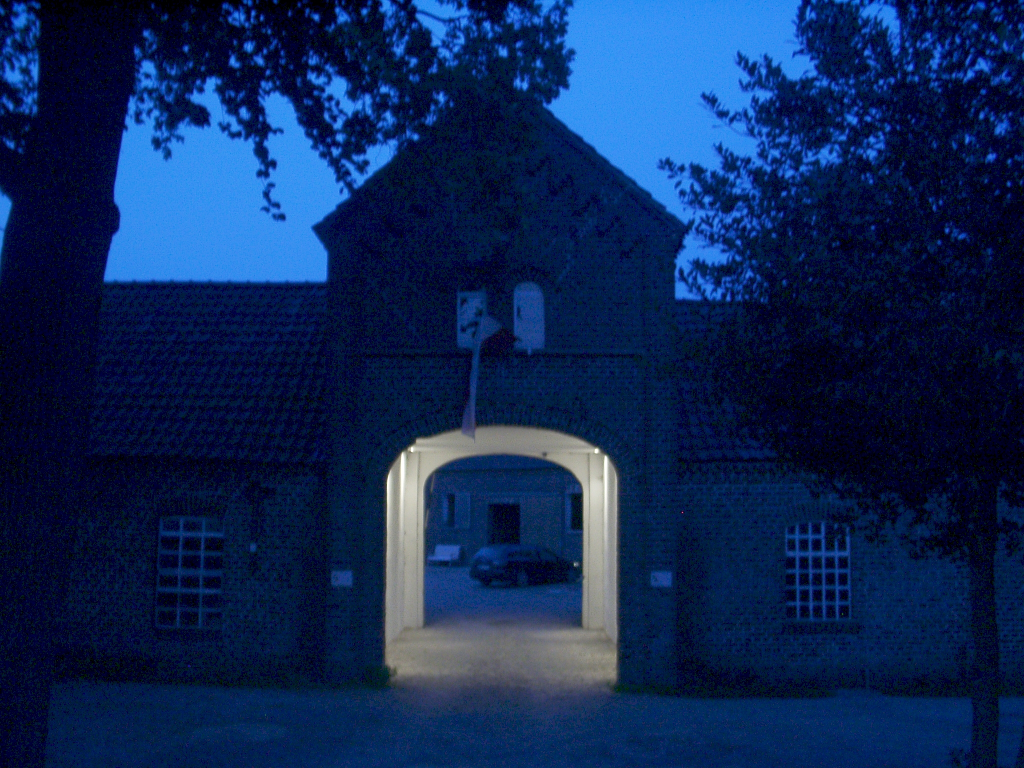 Kamp-Lintfort, Hofanlage Hoogenhof, Xantener Straße 80